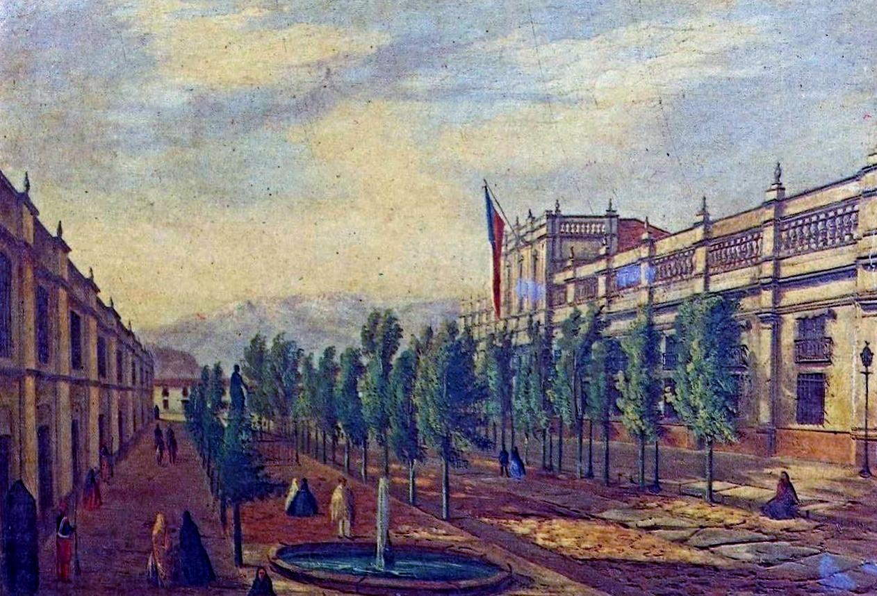 La Casa de Moneda, por Ernest Charton. Se ve la plazuela que separaba La Moneda del edificio que ocupó el Ministerio de Guerra, con árboles, la estatua de del escultor francés Jean-Joseph Perraud, inaugurada el 6 de septiembre de 1860, y dos pilas de aguas (antecesoras a la de Las tres Gracias) a sus costados. El que Charton haya dibujado la silueta de la estatua significa que el óleo es posterior a la fecha de inauguración de esta.